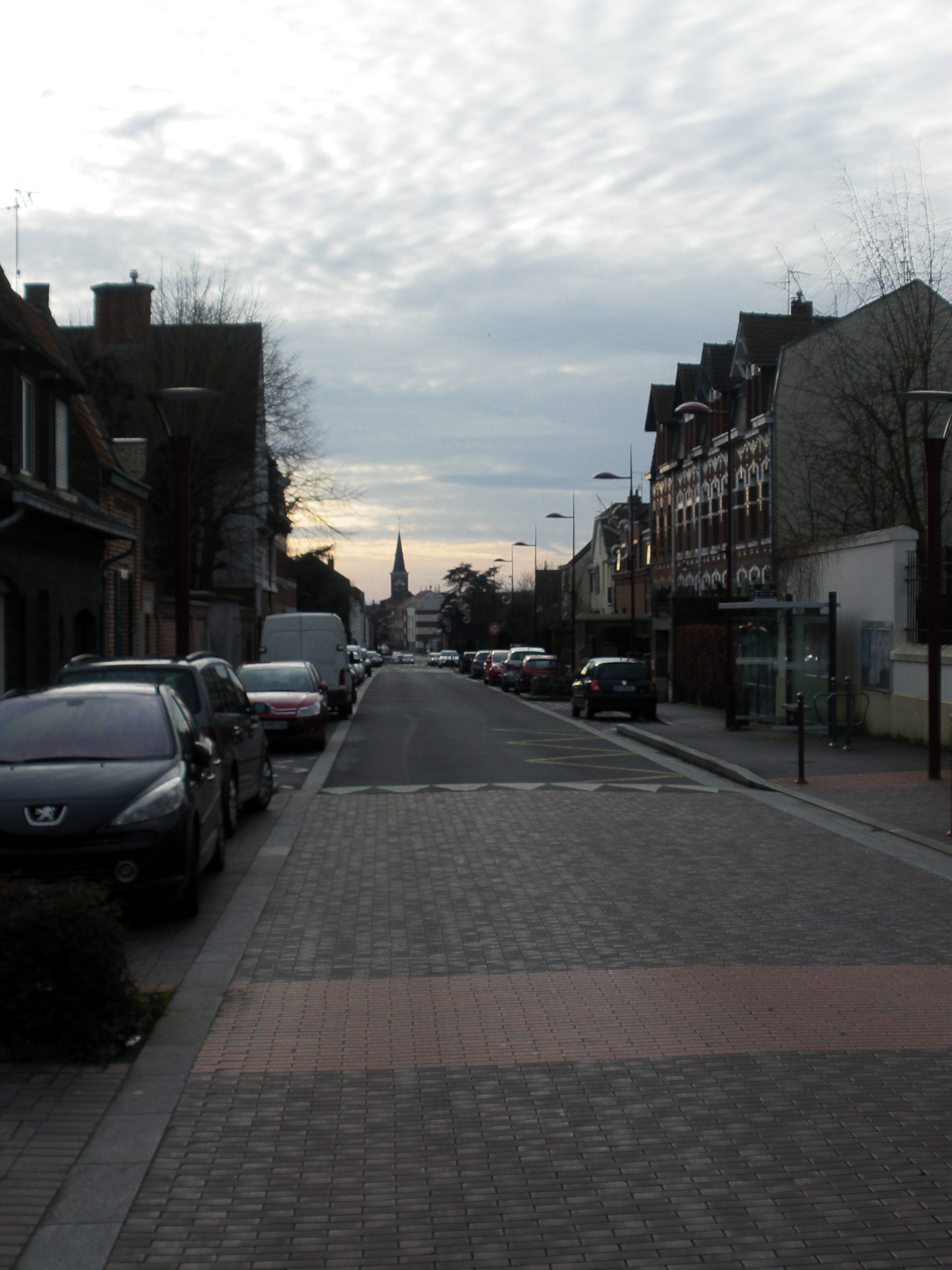 Vue de la rue Jules Guesde de Templemars, à hauteur de l'hôtel de ville.